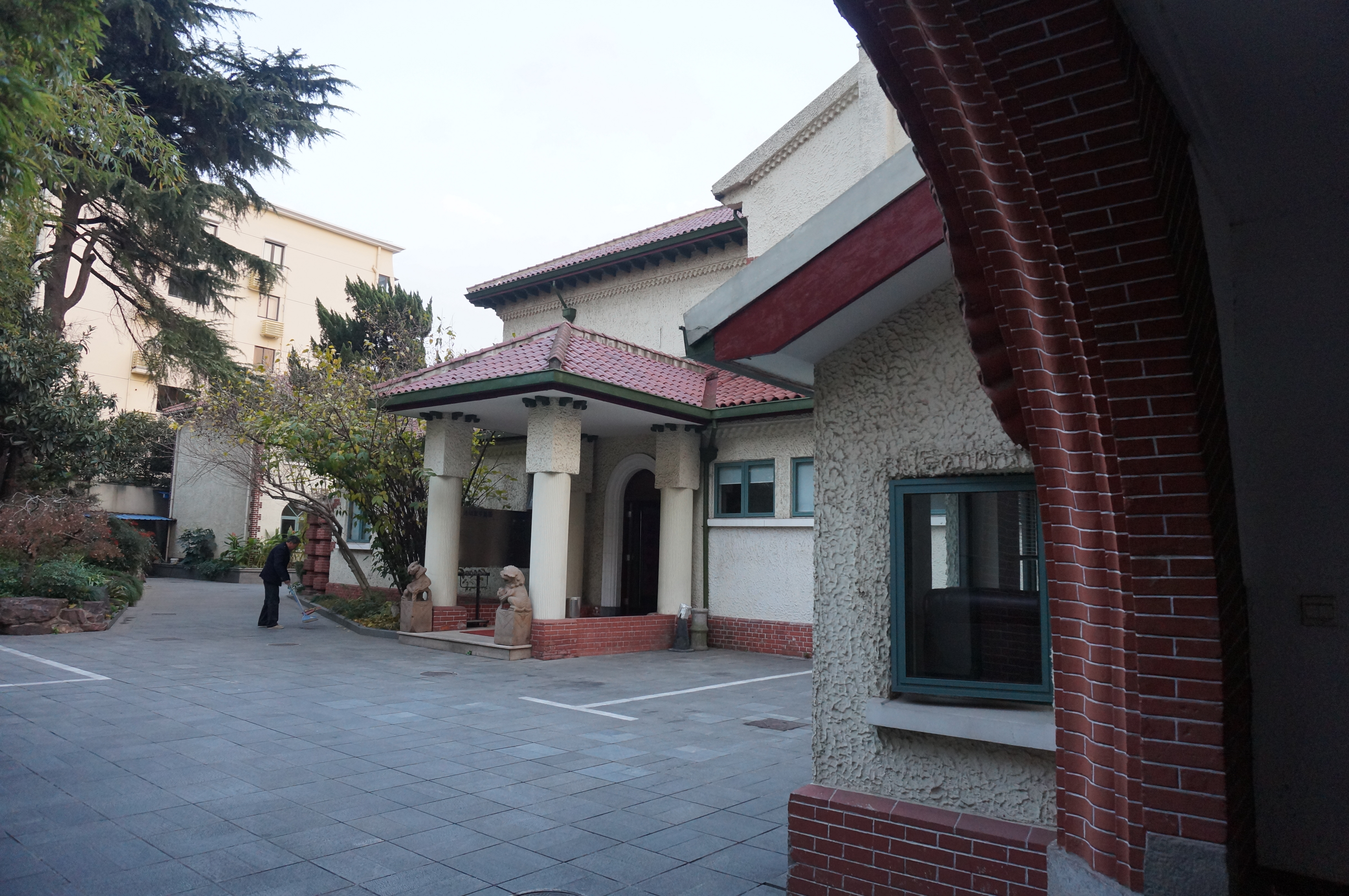 高安路励家花园